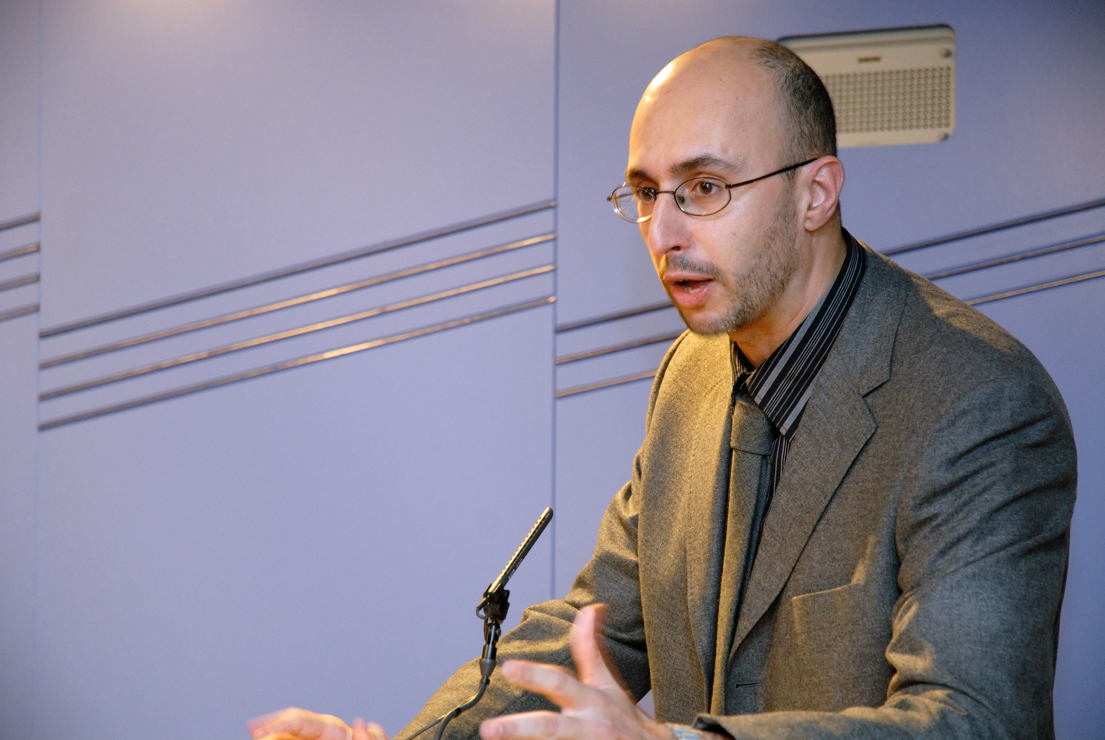 Giovanni Cattini al MHC el 2006.